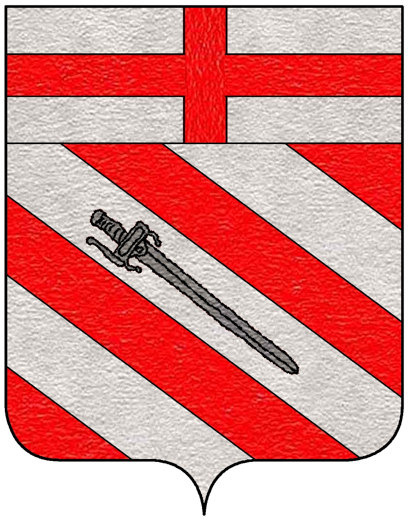 Stemma della famiglia Palmotta (Palmotić)